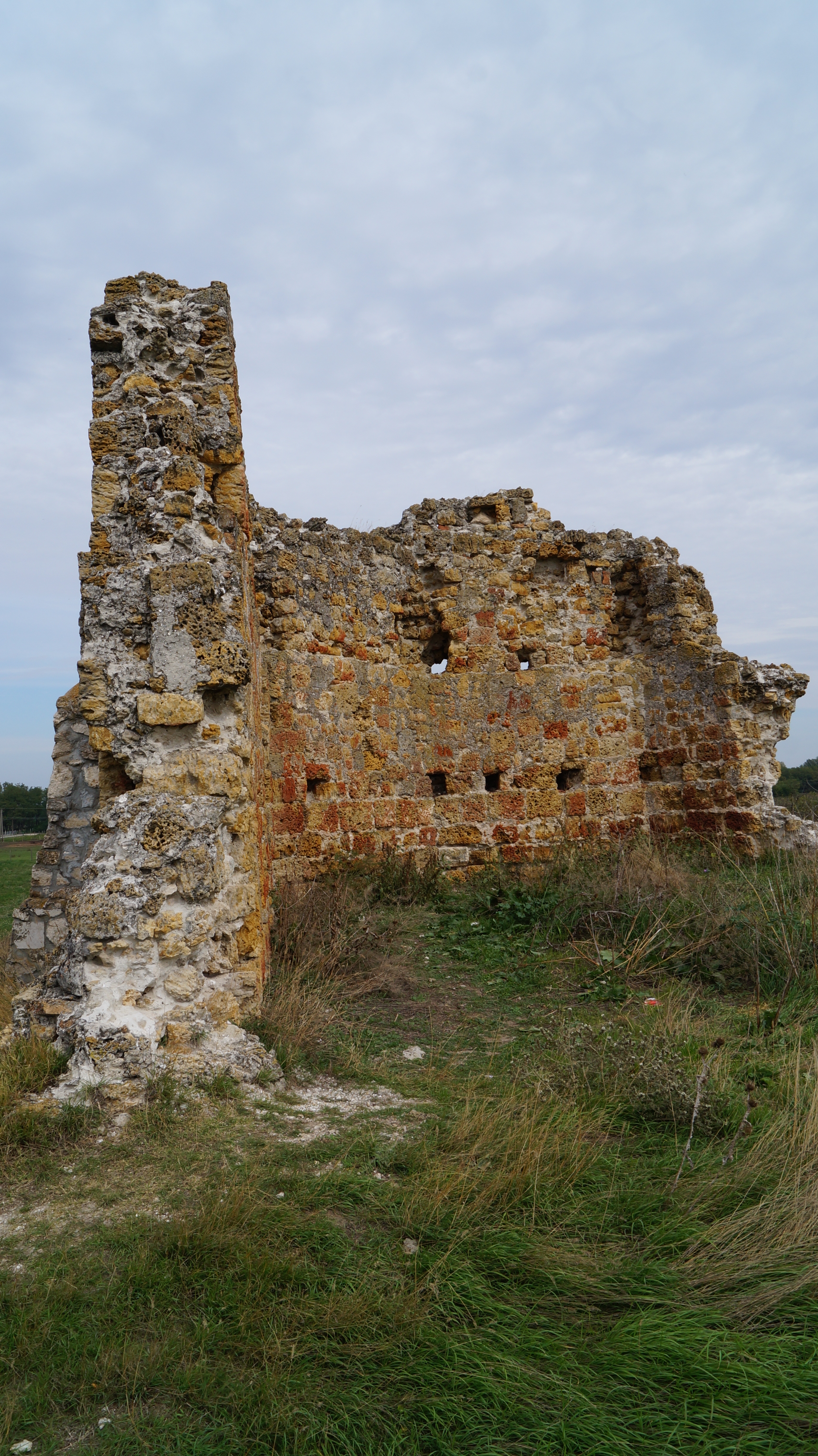 Pusztatemplom romjai, Lajosmizse This is a photo of a monument in Hungary. Identifier: 2326